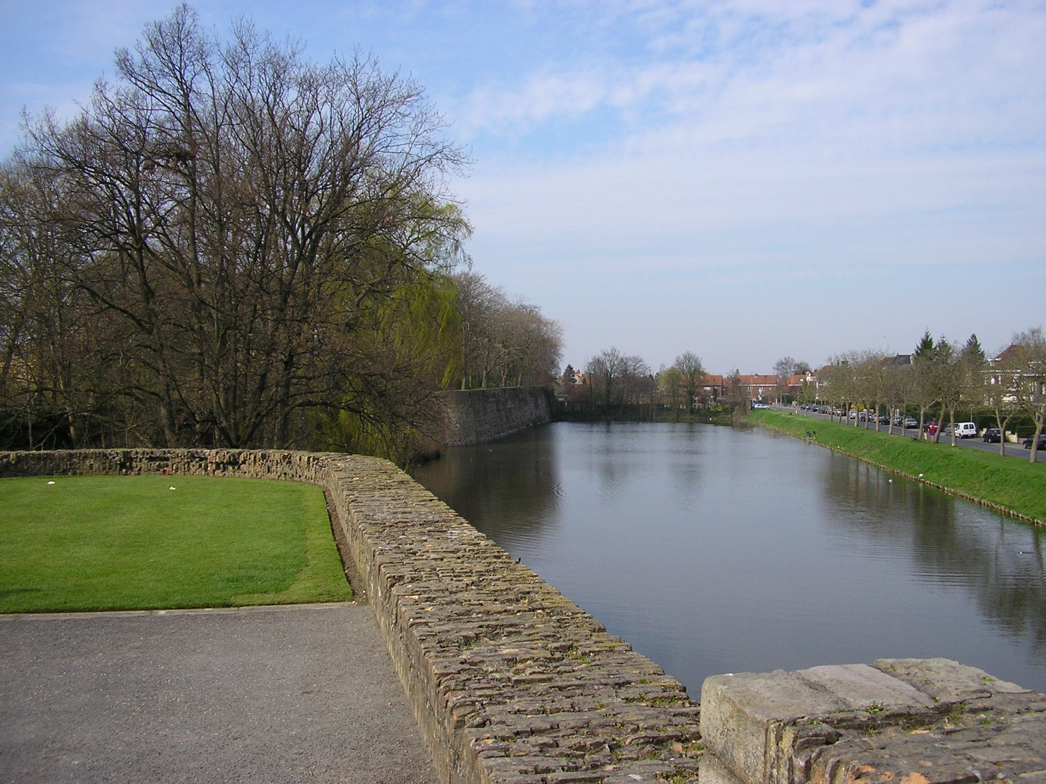 Zicht bovenop de Ieperse vestingen.